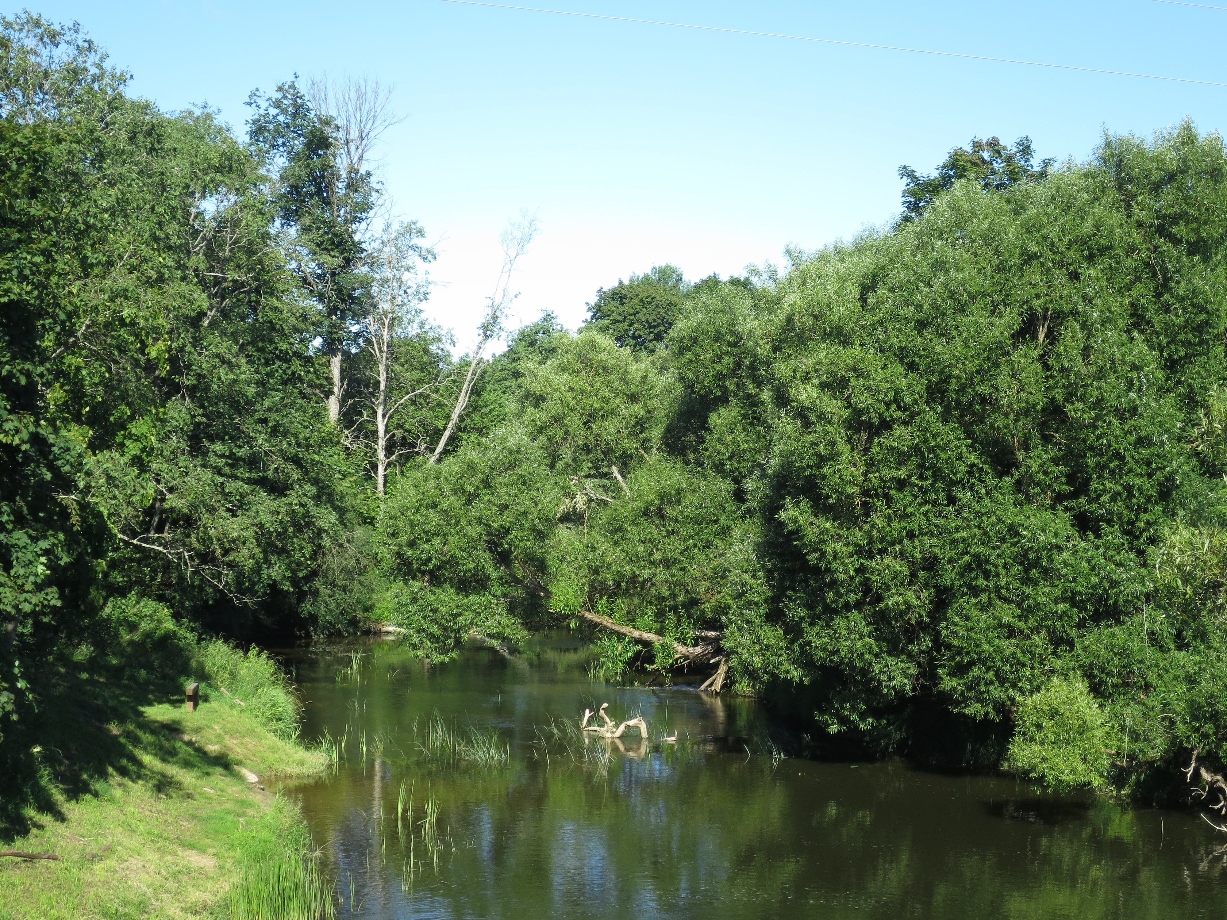 Ciecere, skatoties no V1278 tilta